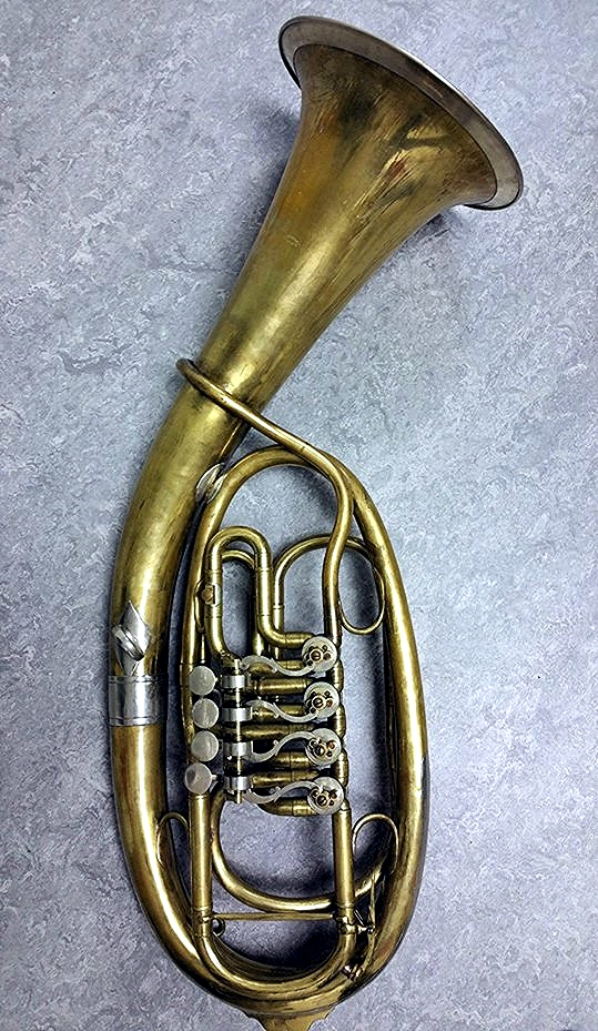 SchediwyTenorhorn.Restauriert von Instrumentenbauer Udo Heindke, Villingen-Schwenningen.